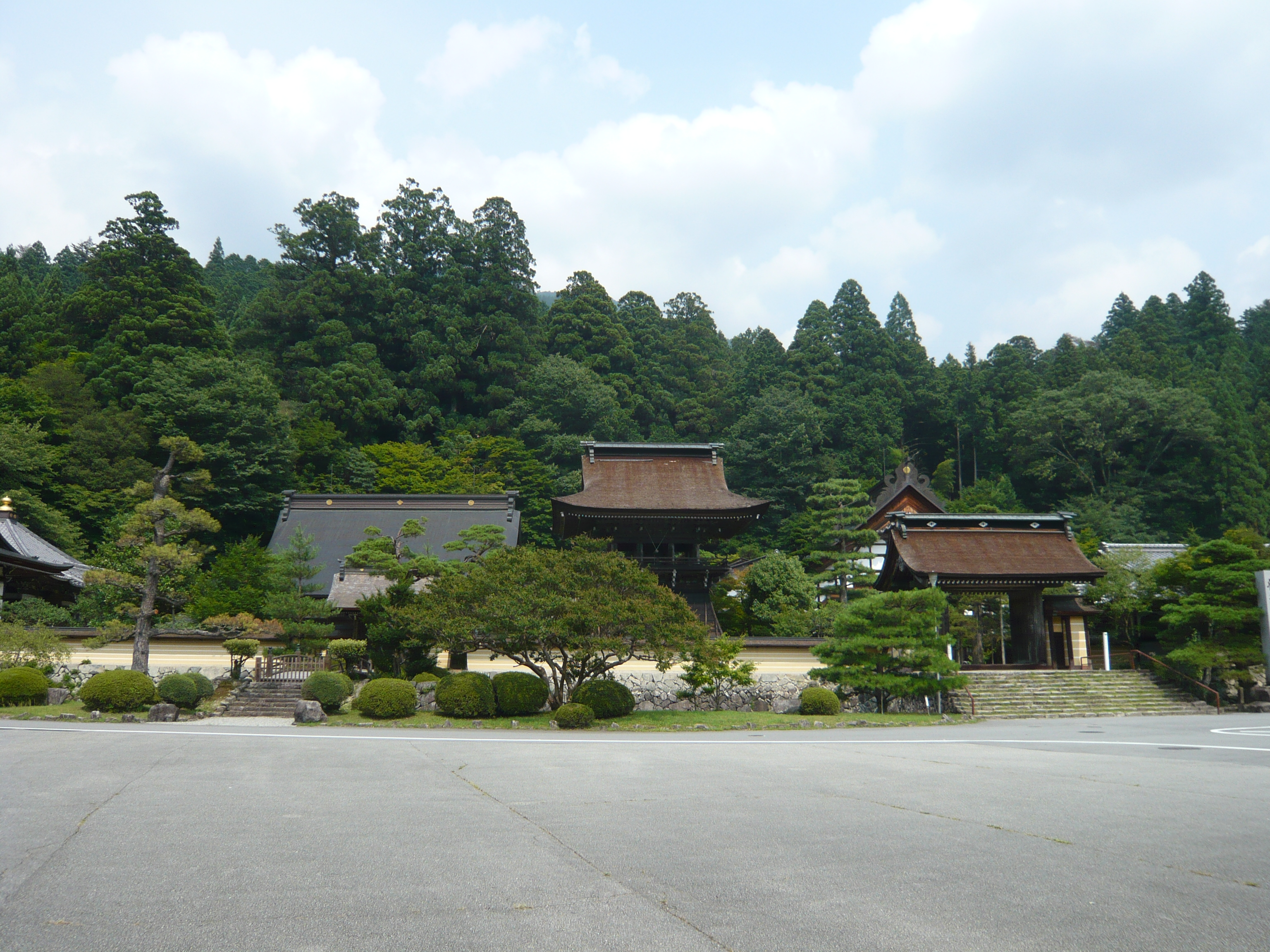 下呂市萩原町中呂の禅昌寺。全景。